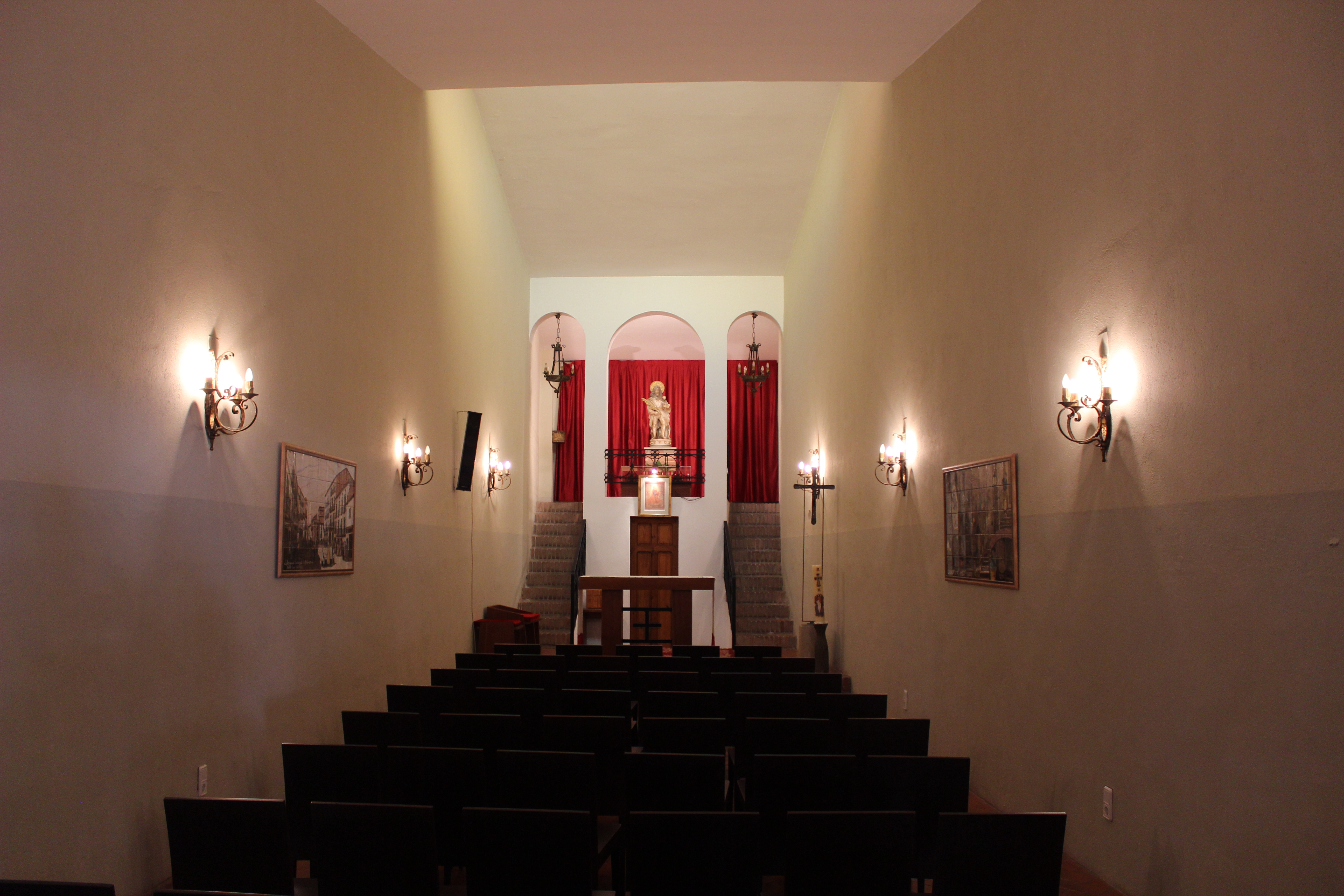 Capella de Sant Isidor (Mollerussa)